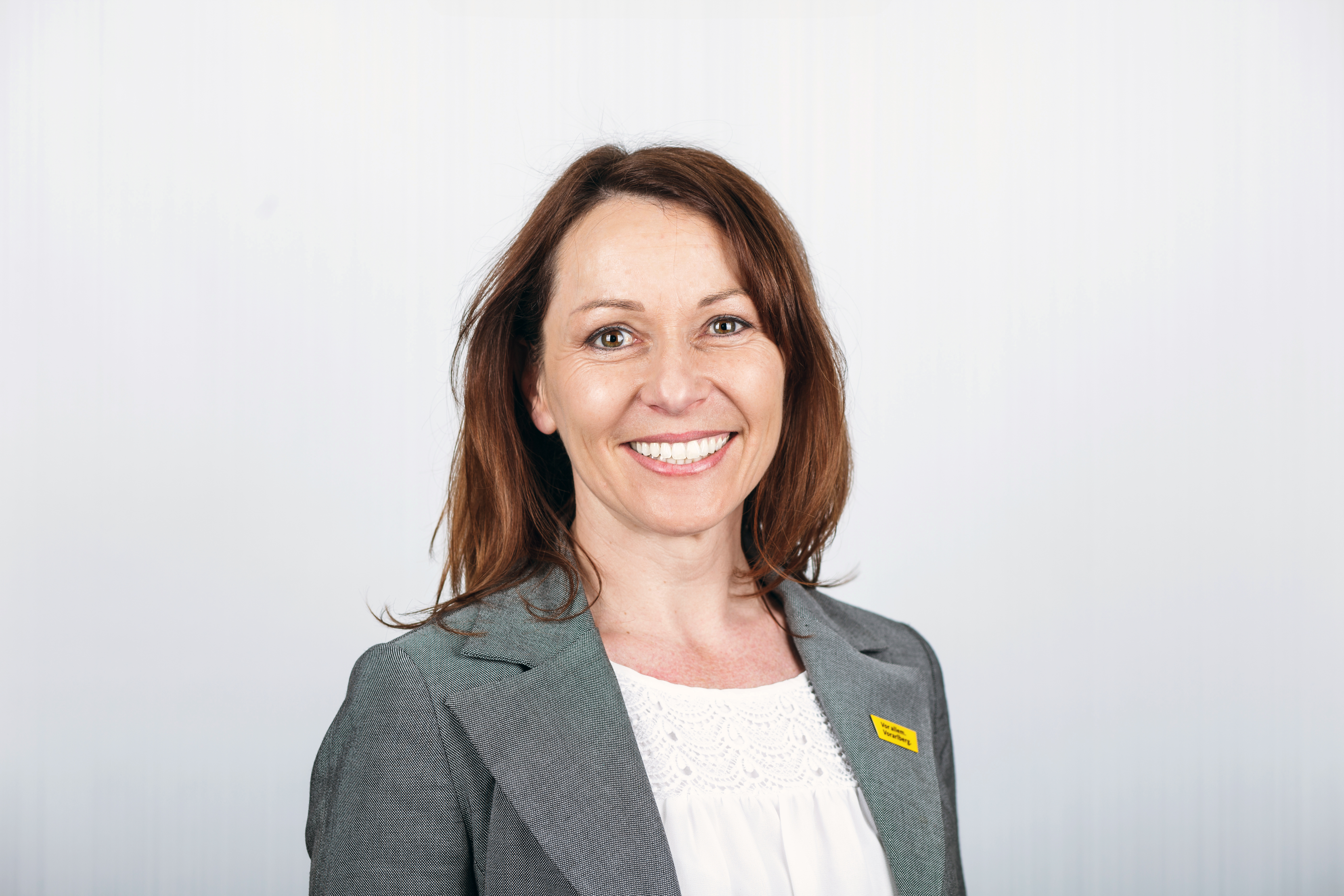 Martina Rüscher, Abgeordnete zum Vorarlberger Landtag ab 2014.